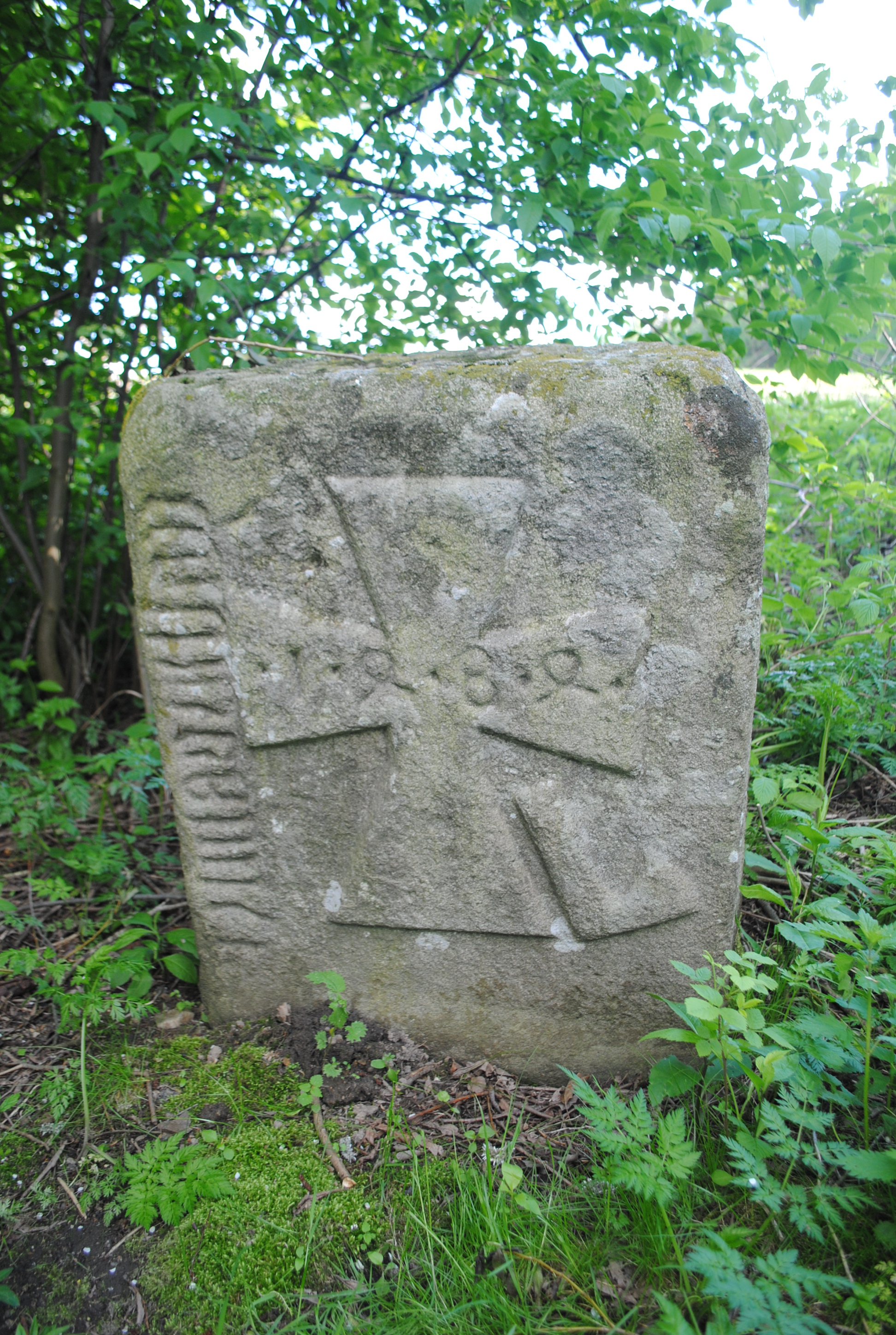 Pamětní kámen, jihovýchodně od obce, vlevo od silnice na Jihlavu, Smrčná.